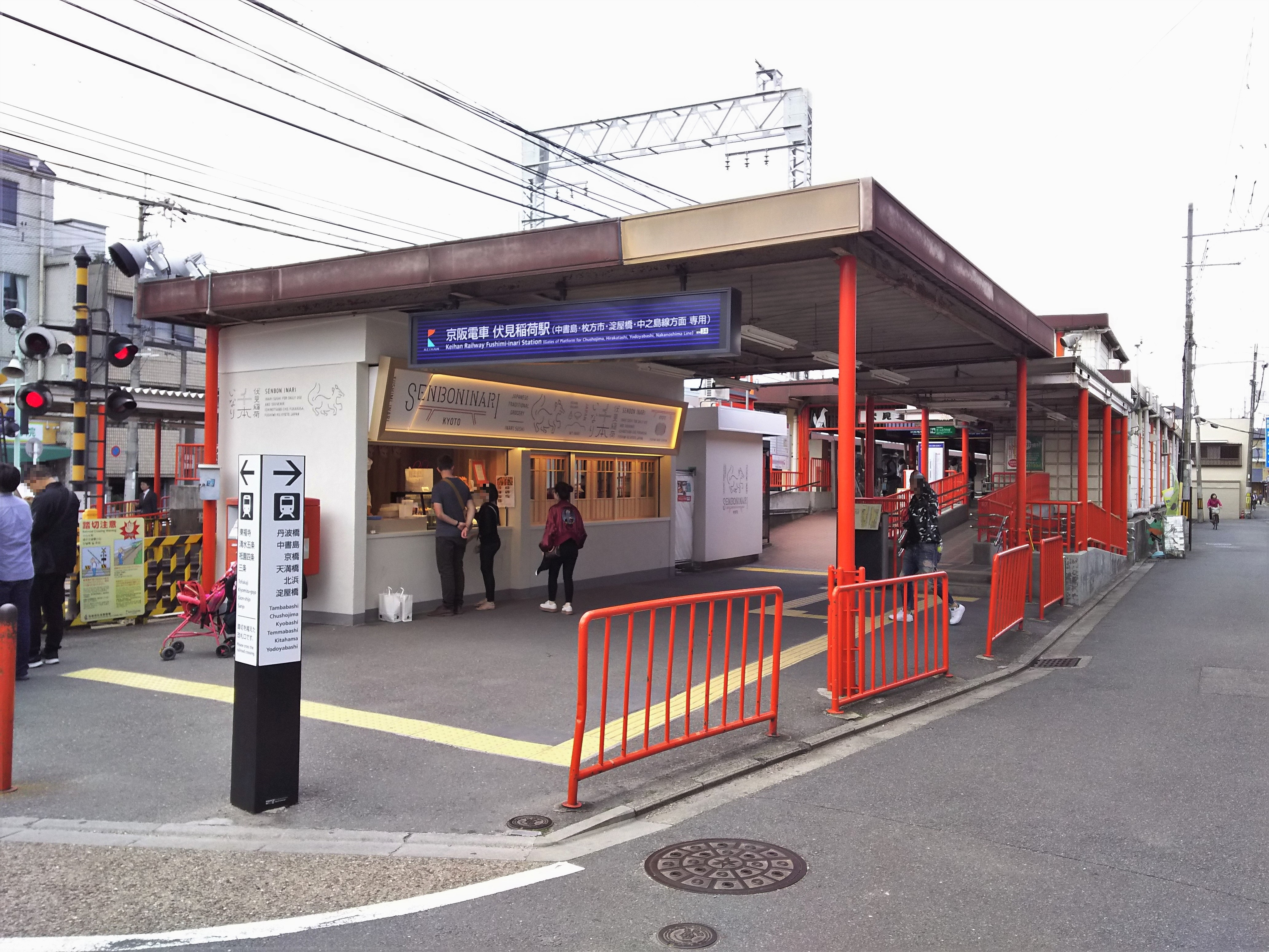 京阪本線伏見稲荷駅淀屋橋方面駅舎（京都市伏見区）